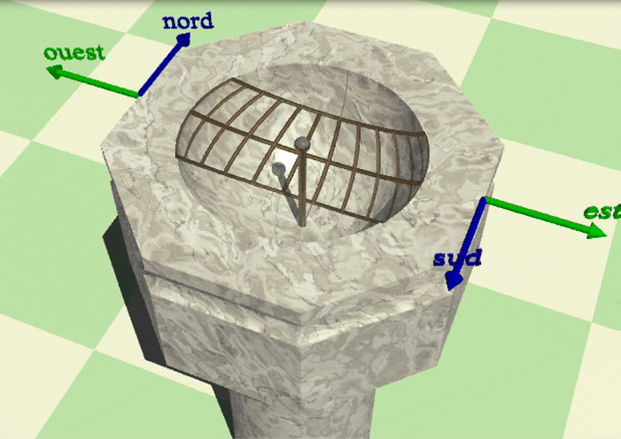 Cadran solaire antique de type hémisphérique dit Scaphée.